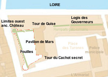 Plan d'une partie du château de Tours, tel que révélé par les fouilles des années 1970, laissant apparaître à l'ouest la partie reprise de l'enceinte du bas-empire (époque Gallo-Romaine) pour l'édification du château en 1160 par Henri II Plantagenet. La partie blanche bordée de rouge indique la zone des fouilles délimitée par cette enceinte où seront découverts des thermes Gallo-Romains. La partie plus sombre (ocre foncé) figure ce qu'il reste du château actuellement, après sa destruction à la période révolutionnaire et le remodelage de ce qu'il en restait par l'armée, qui occupera les lieux jusqu'a la fin du XX° siècle, profitant de la totale destruction de la partie Est de l'édifice du XIII° siècle, pour construire de nouveaux bâtiments. En évidence, les limites du château du XIII° siècle bordé de ses quatre tours.